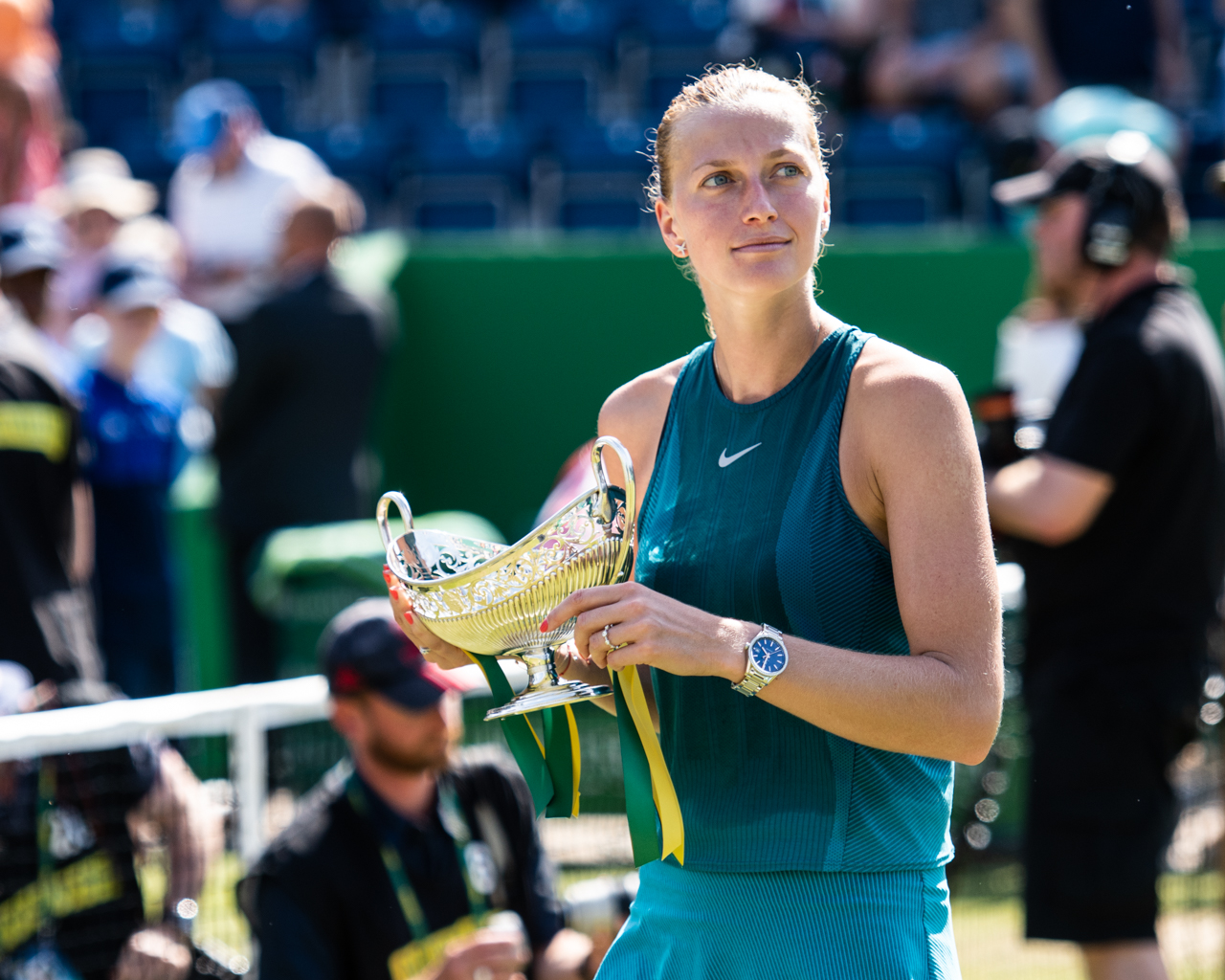 Petra Kvitova